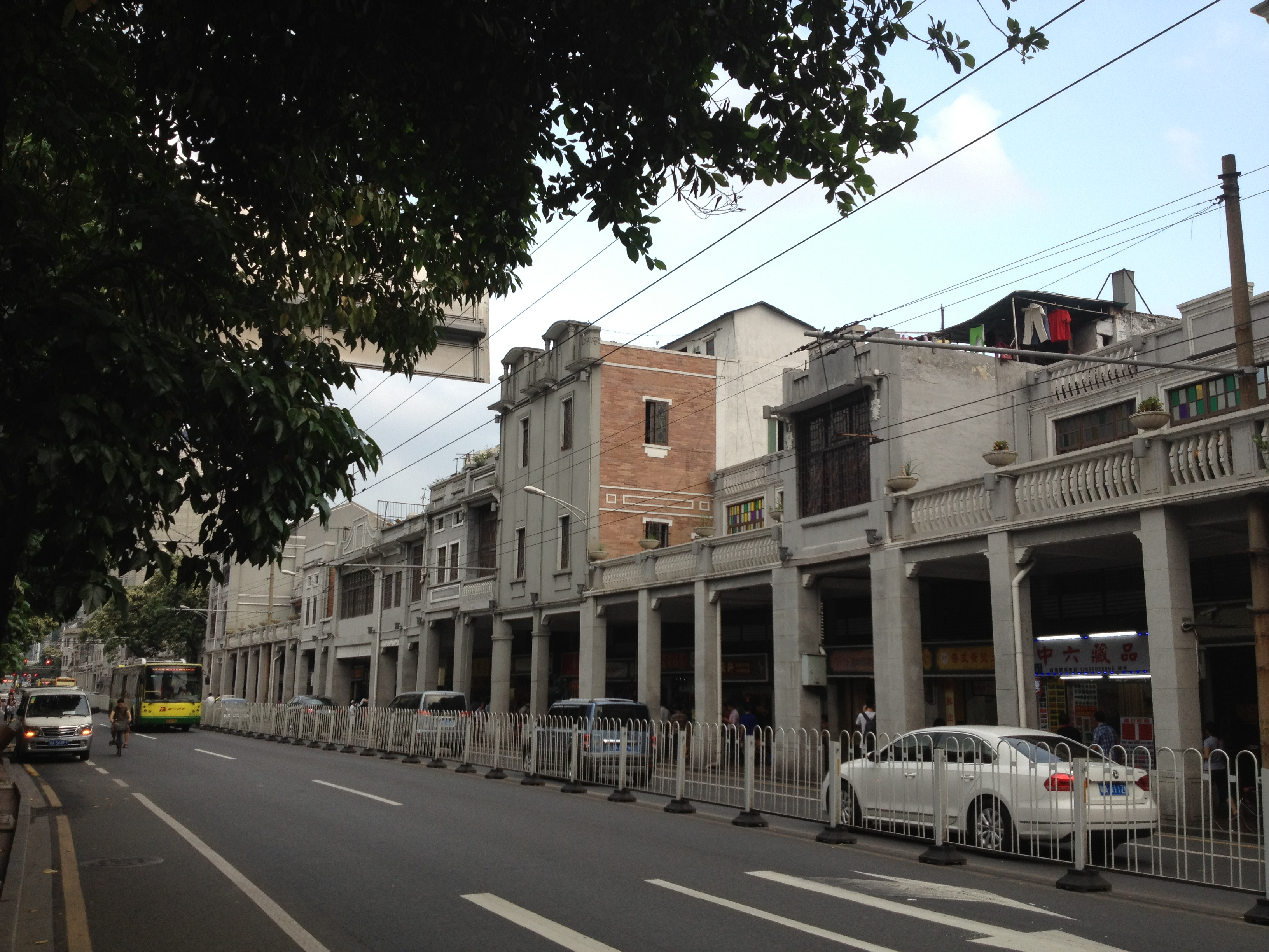 廣州市中山六路騎樓。